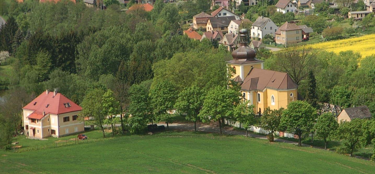 Strašice, kostel sv. Vavřince a bývalá škola